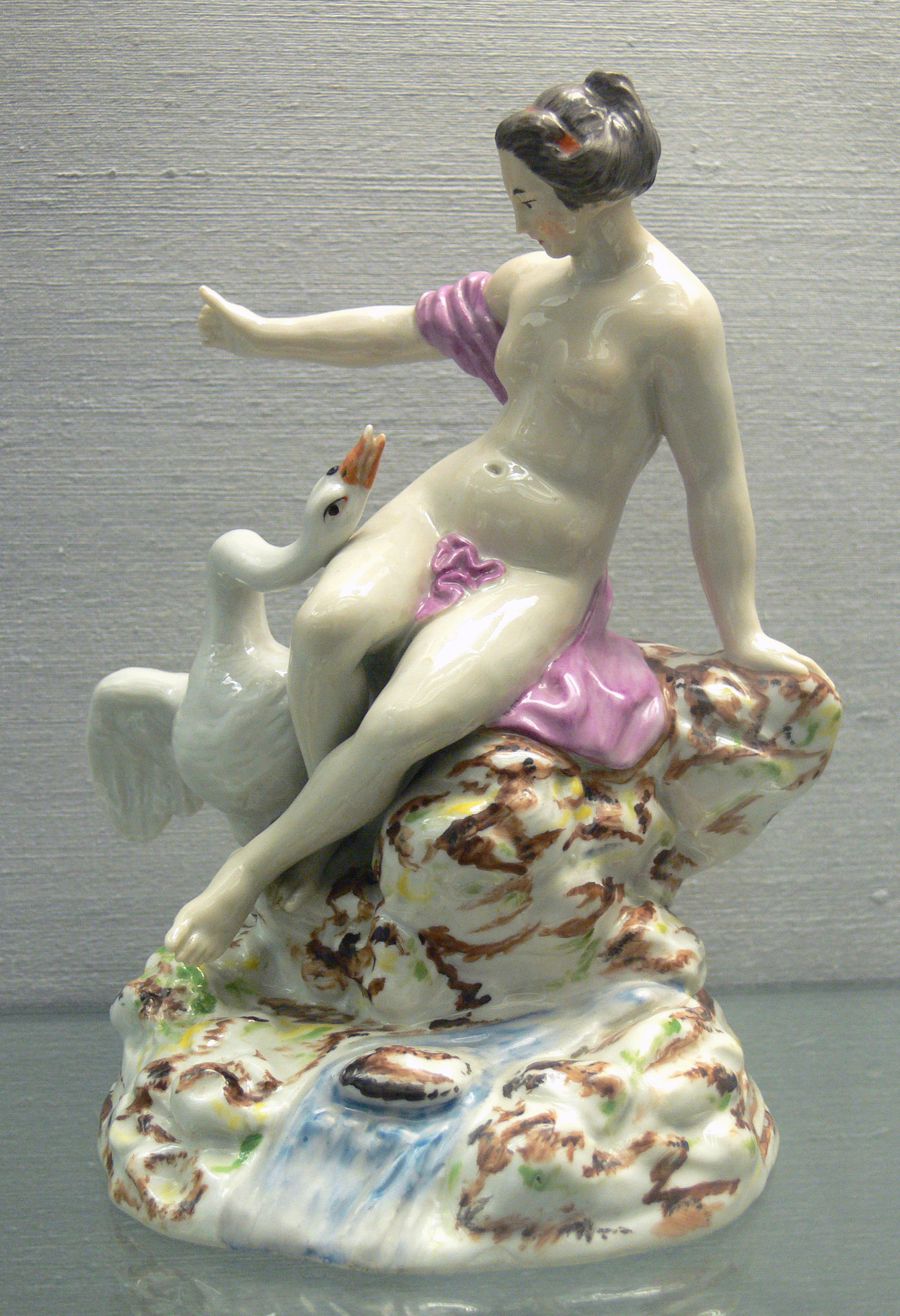 Leda mit dem Schwan, Porzellan, Volkstedt um 1785 Kunstgewerbemuseum Berlin, Inv. Nr. 08,105